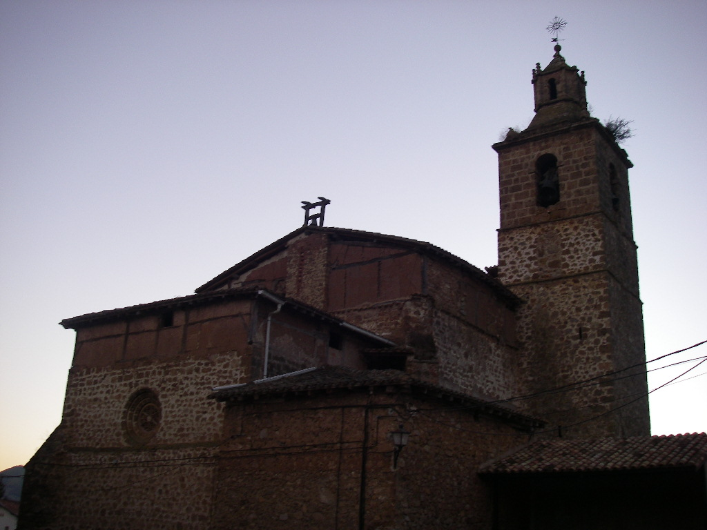 Iglesia de San Martín en Nestares (La Rioja)